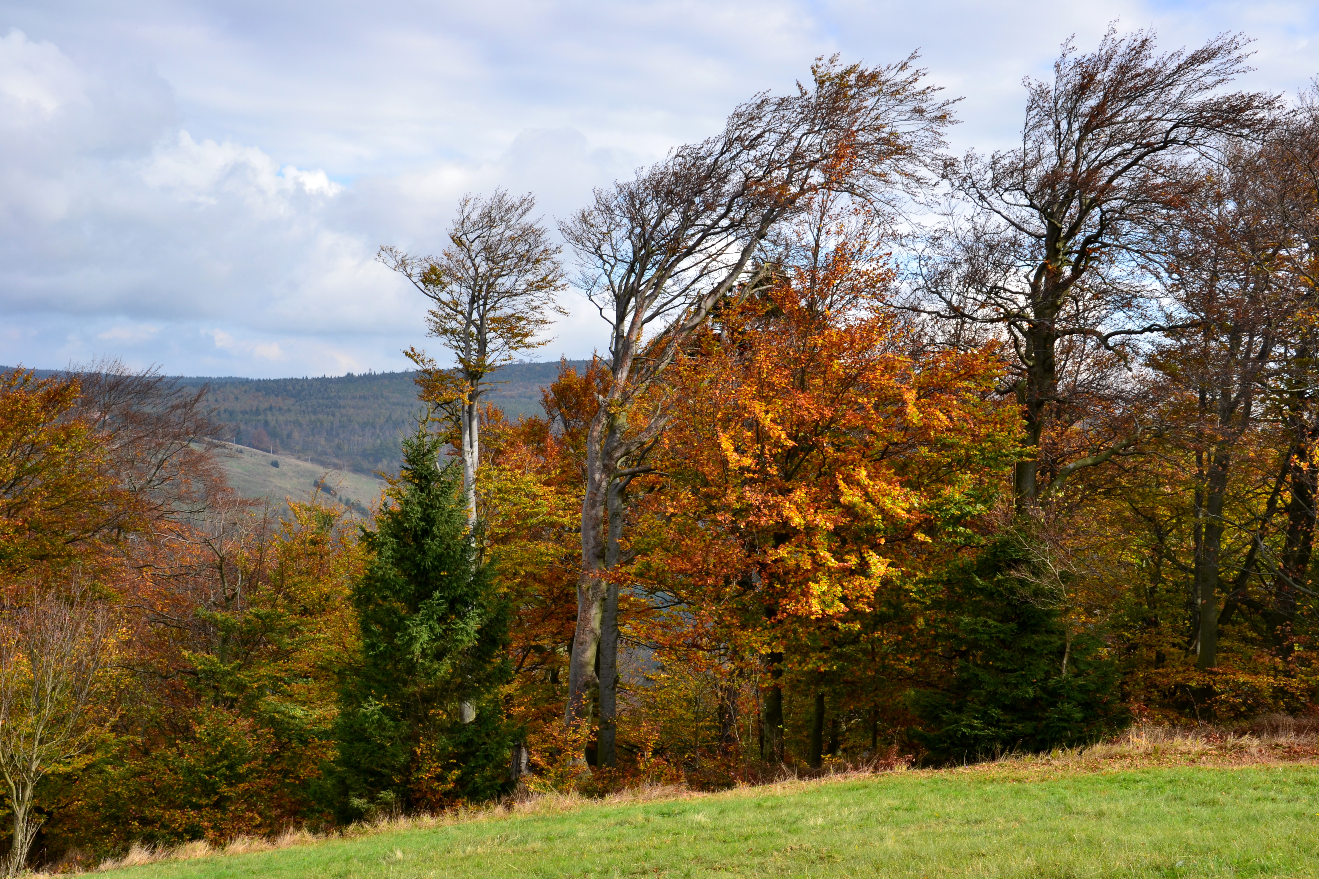 Přírodní památka Buky na Bouřňáku - větrem tvarované koruny